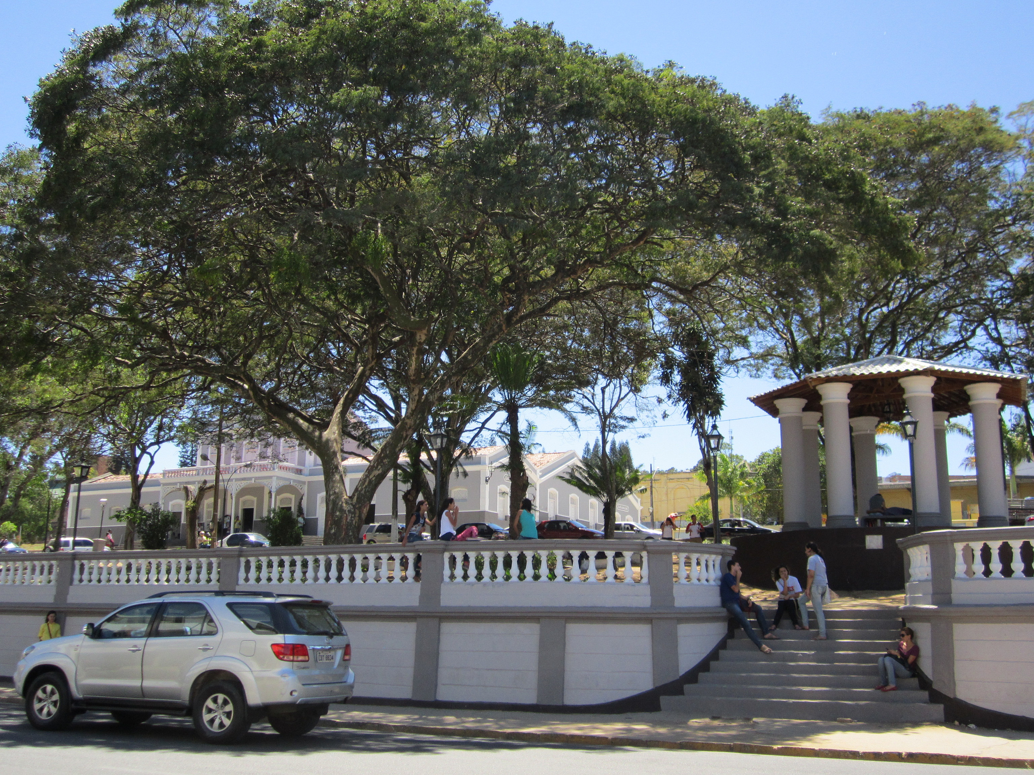 Praça Dom Moura - Garanhuns, Pernambuco, Brasil